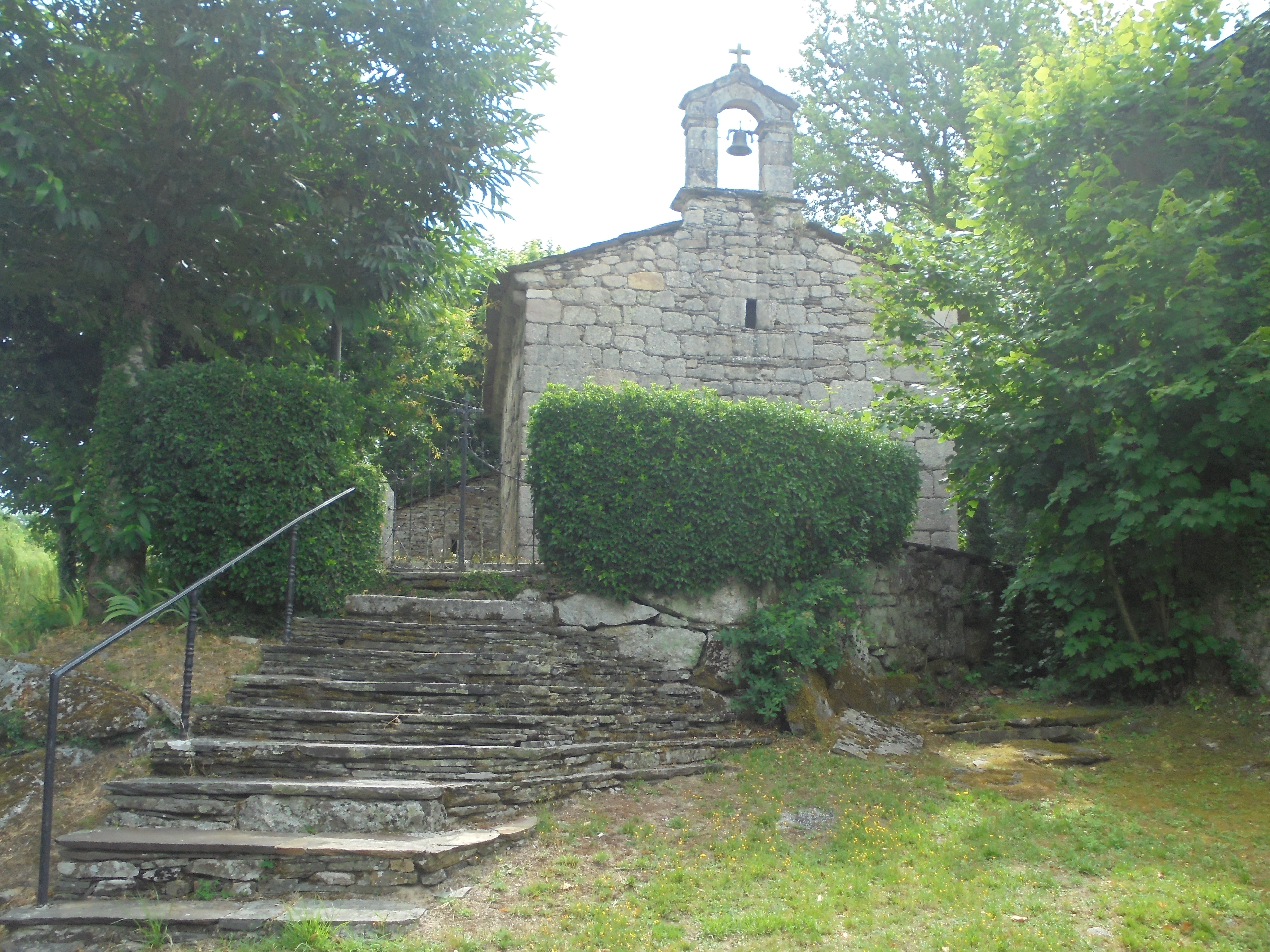 Igrexa parroquial de Cabreiros ( O Corgo)